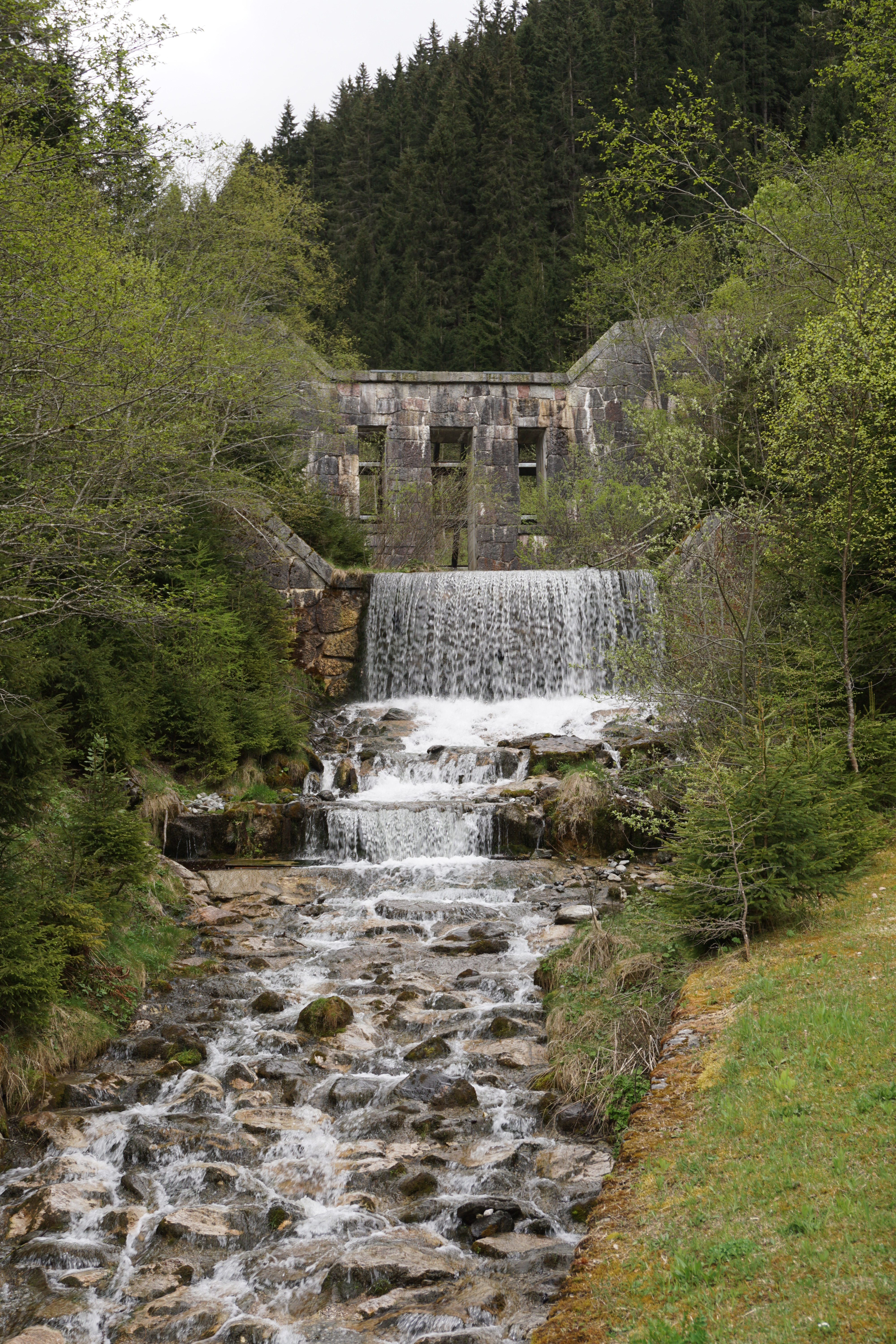 1981 wurde am Schluchtausgang oberhalb von Axams eine Geschiebesperre errichtet.